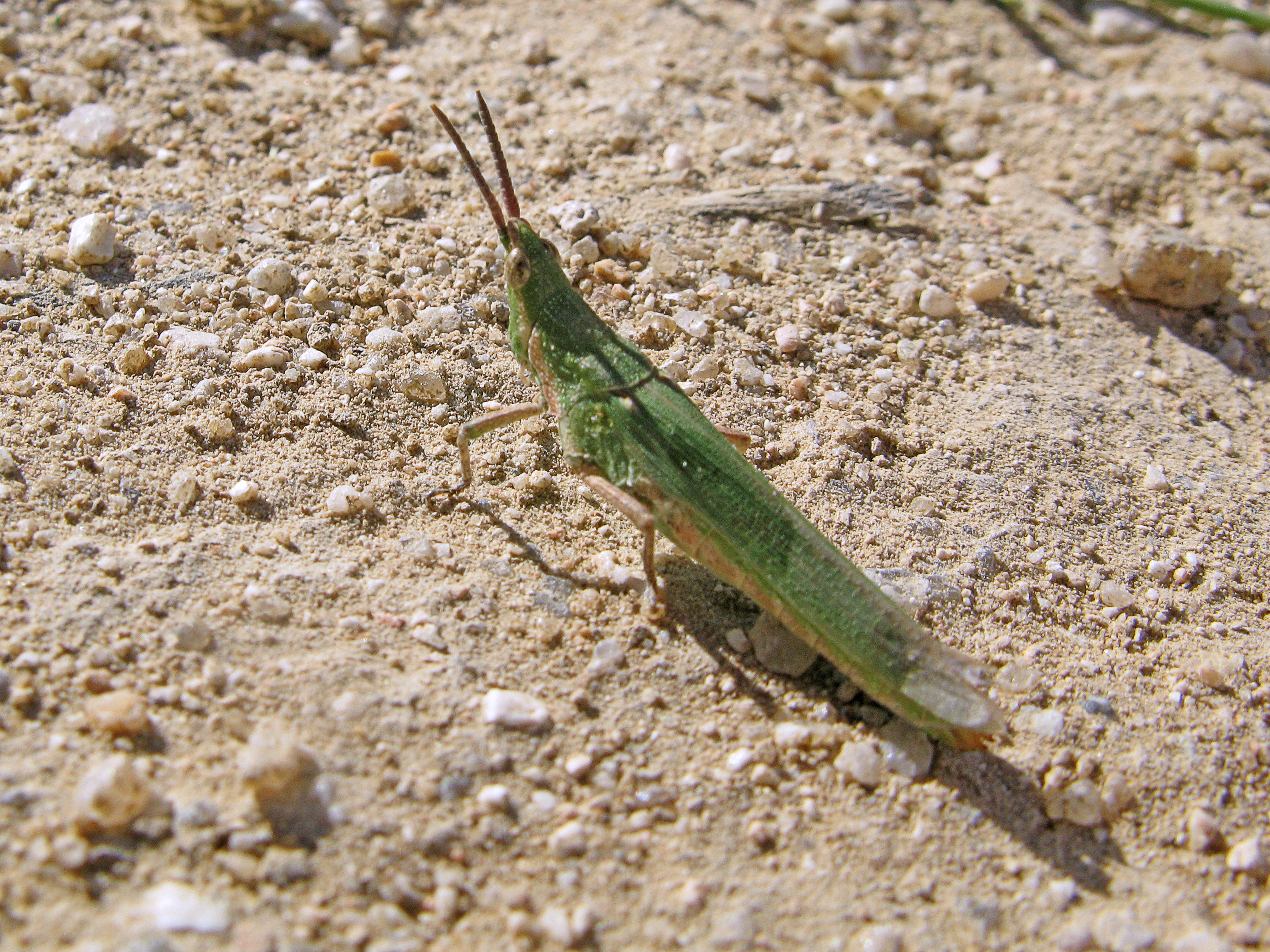 Estos pequeños ortópteros se caracterizan por su cabeza cónica y el perfil oblicuo de su frente. Dependiendo de su entorno pueden ser de color verde, marrón, amarillo, gris y los colores intermedios como marrón claro, verde claro, Está presente en en toda la Península Ibérica, aunque escasa en la franja cantábrica. Viven en ambientes pedregosos, arenosos y secos